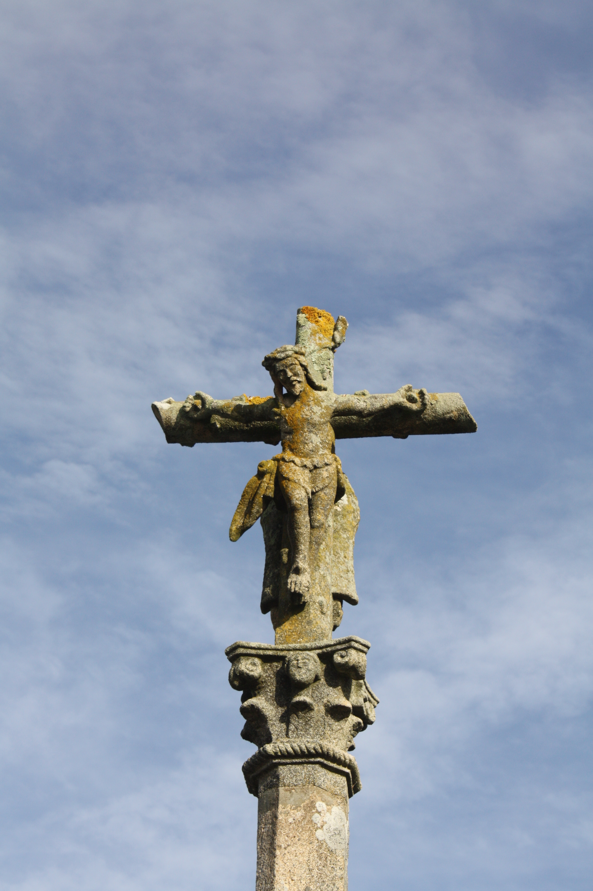 Cruceiro nas Laxes, próximo á igrexa de San Mamede de Corvillón (Cambados, Pontevedra)